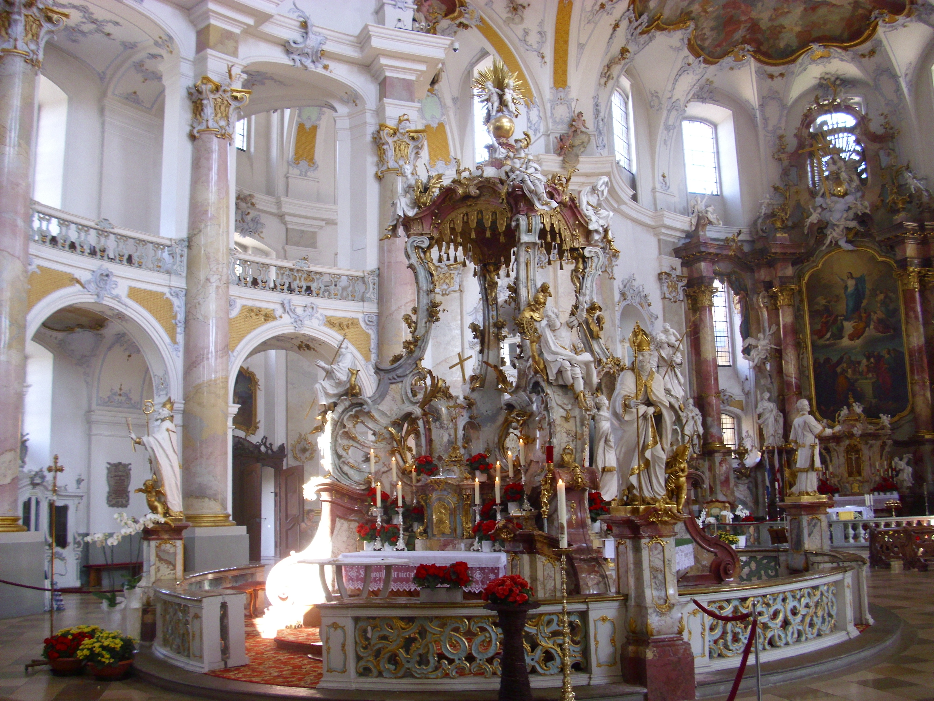 Innenansicht der Basilika Vierzehnheiligen bei Bad Staffelstein, welche von 1743 bis1772 durch den Architekten Balthasar Neumann im Stil des Rokoko erbaut wurde.